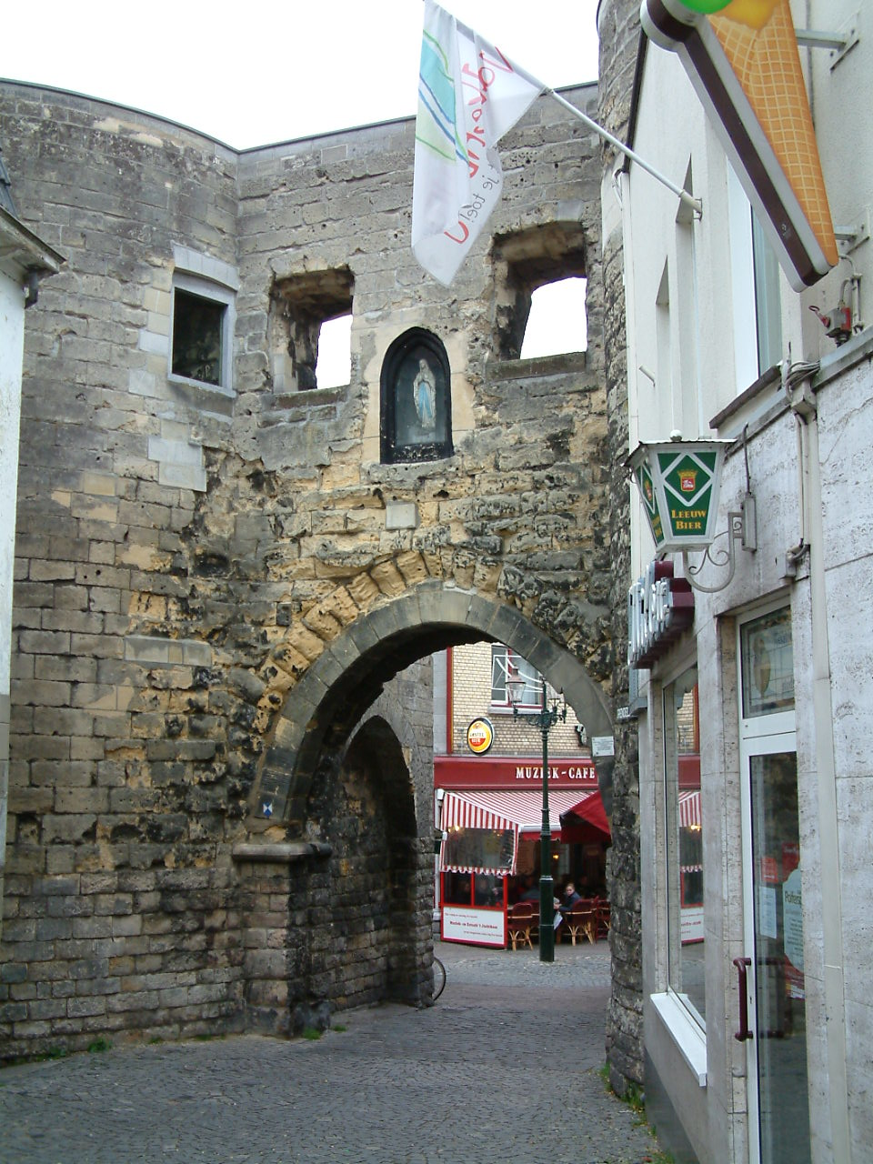 Grendelpoort Grendelpoort, Valkenburg, the Netherlands